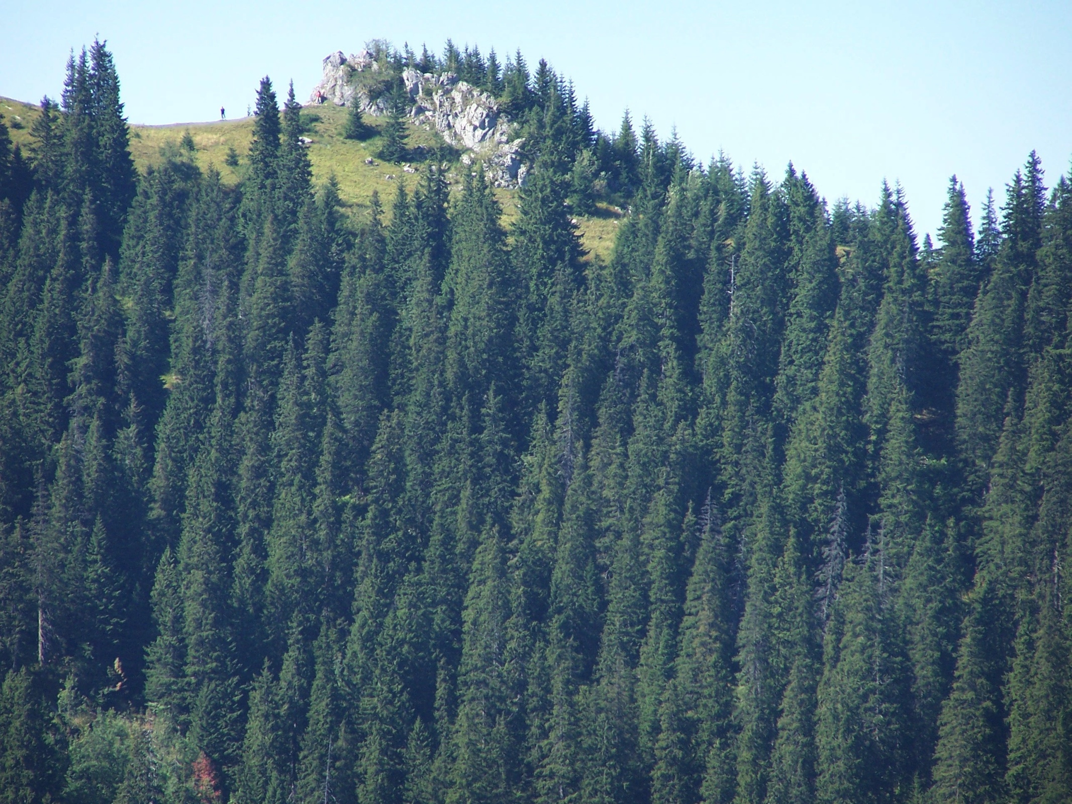 Piec, widok ze szlaku przez Kobylarz